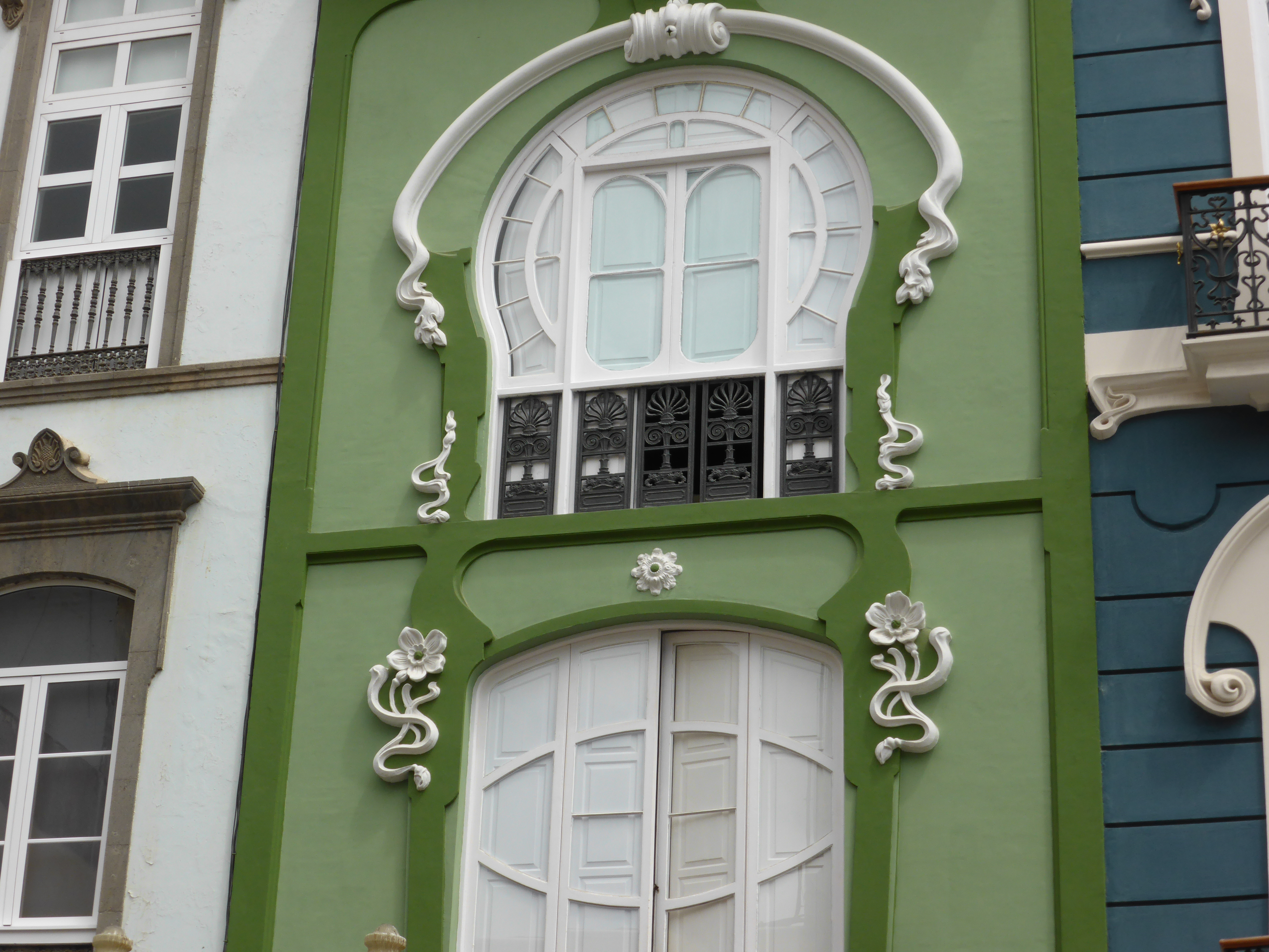 En la Calle Mayor de Triana, de Las Palmas, se encuentran algunos edificios modernistas, construidos por el año 1908.